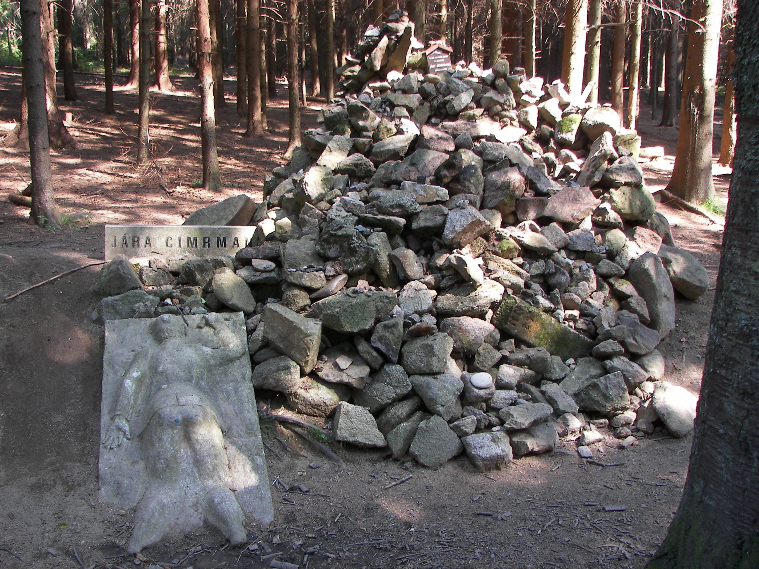 Odlitek Járy Cimrmana, vyloučeného z přepravy v zastávce Kaproun a mohyla